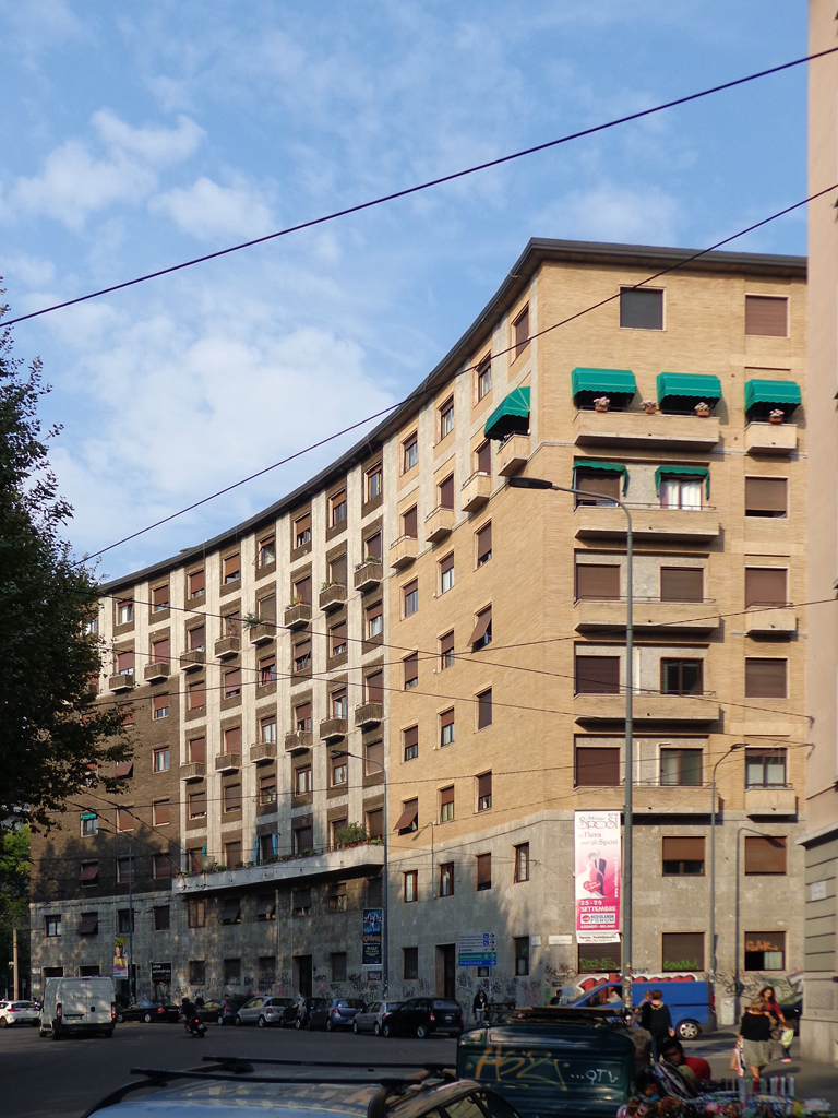 Milano, edificio residenziale in piazzale Gabrio Piola nn. 4-6-8. Fu costruito dal 1940 al 1941 su progetto di Antonio Cassi Ramelli.Fonte: Elisabetta Susani (a cura di), Cassi Ramelli. L’eclettismo della ragione, Milano, Jaca Book, 2005, pp. 246-247. ISBN 88-16-60339-9.